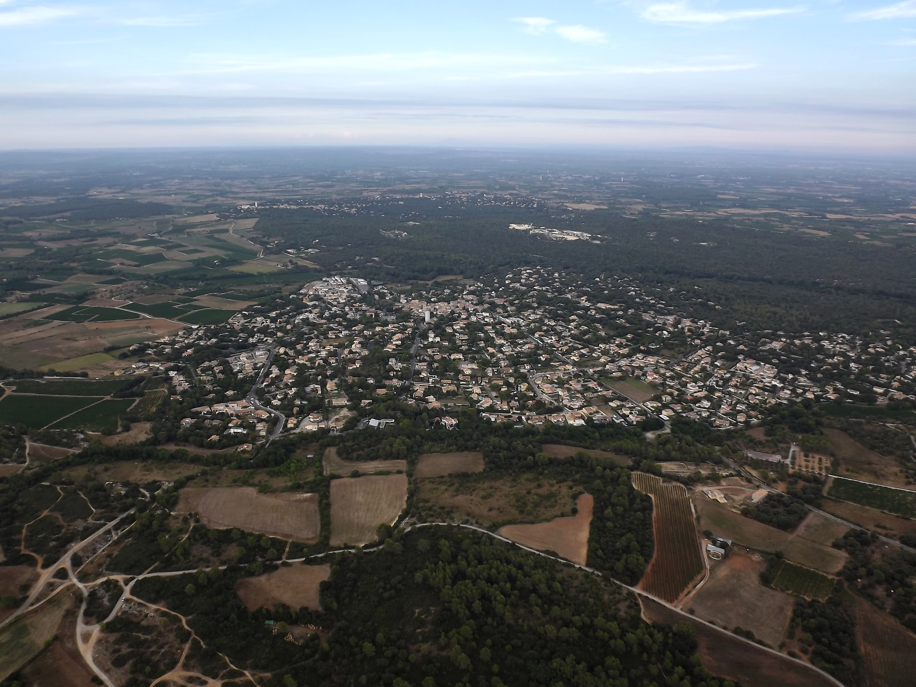 Vue aérienne